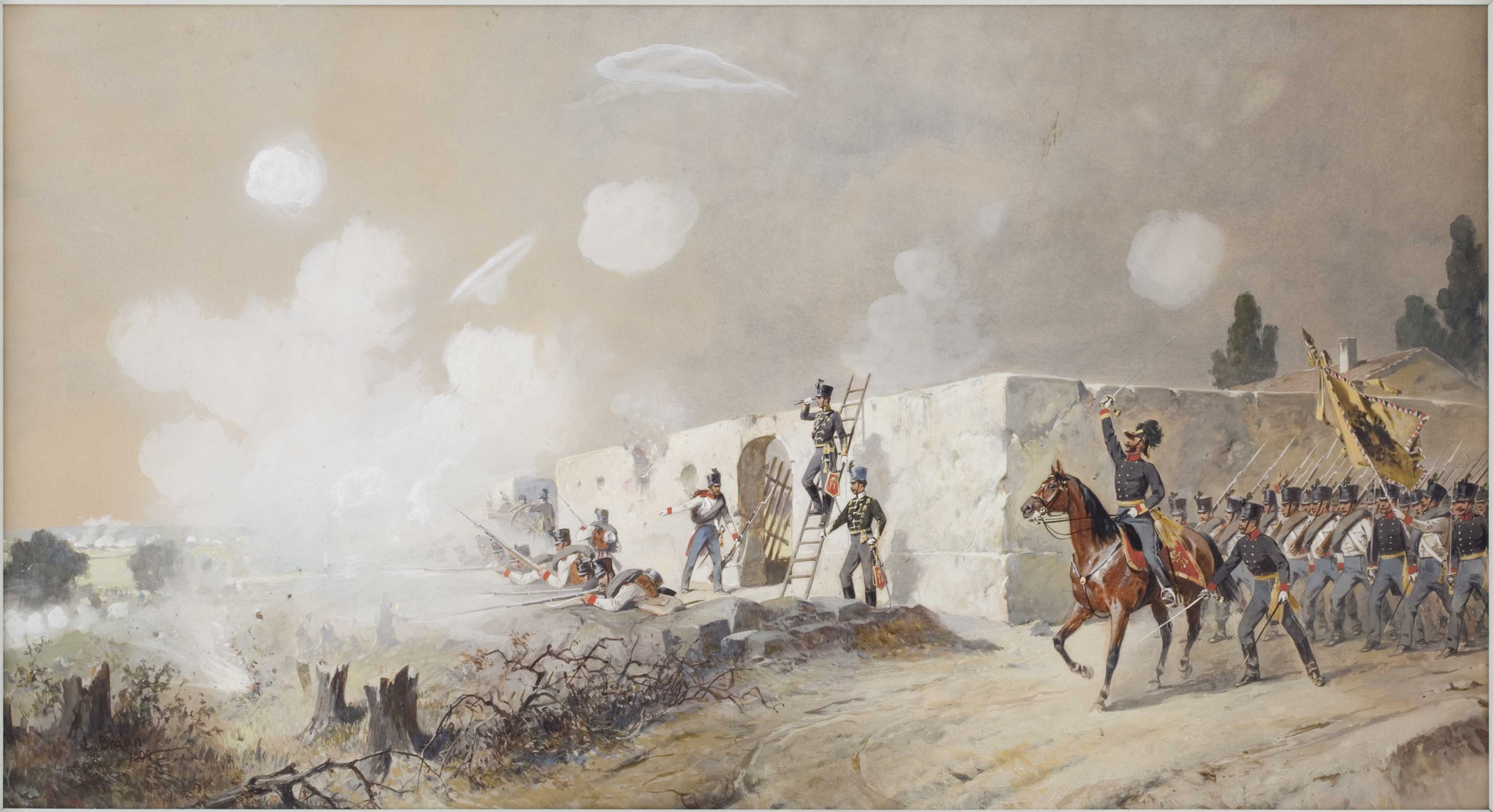 Louis Braun (1836 - 1916) - "Erzherzog Franz Joseph in der Schlacht bei Santa Lucia am 6. Mai 1848". Gouache auf Papier. Der spätere Kaiser steht auf einer Leiter, um die anrückenden Piemontesen zu beobachten, während der Kadett Zwierzina den Flügeladjutanten Graf Mensdorff-Ponilly auf die Gefahr hinweist, in der sich der Erzherzog befindet. Einige Minuten später, nachdem Franz Joseph den Ort verlassen hatte, wurde die Leiter von einer Granate getroffen. Rechts Major Kortz zu Pferd vor seinen Infanteristen des 45. Infanterie-Regiments. Links unten signiert "L. Braun 1899", Bildmaße 118 x 65 cm, blattvergoldeter Rahmen. Louis Braun war einer der bedeutendsten bayerischen Militärmaler, studierte in Stuttgart, München und Paris, nahm an den Feldzügen 1864, 1866 und 1870/71 teil (vgl. Thieme-Becker, Bd. IV, S. 549). Historisch interessante Szene aus den Kämpfen in Oberitalien.